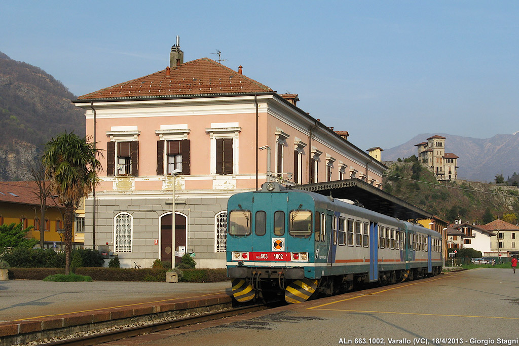 Stazione ferroviaria di Varallo Sesia. In sosta una coppia di automotrici ALn 668 delle Ferrovie dello Stato (in testa la 1002).